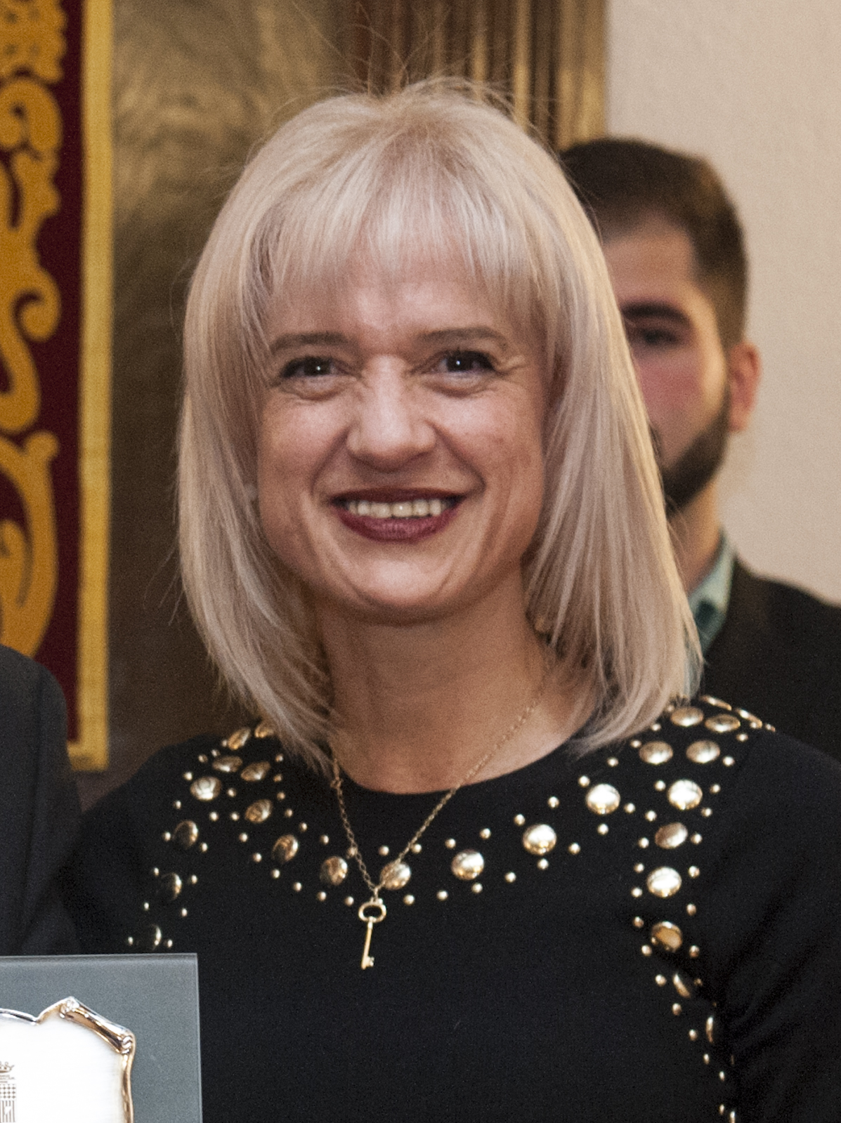 L'Andalús de l'Any 2019: Miguel Alba